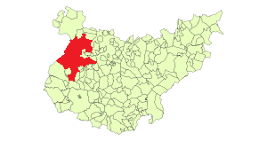 Situación de la ciudad de Badajoz en la provincia de Badajoz